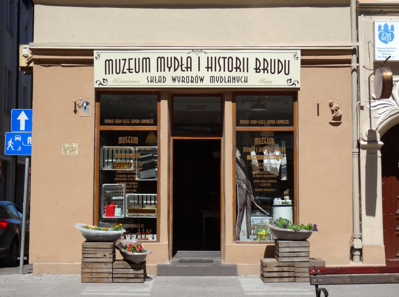 Muzeum Mydła i Historii Brudu w Bydgoszczy - u. Długa 13